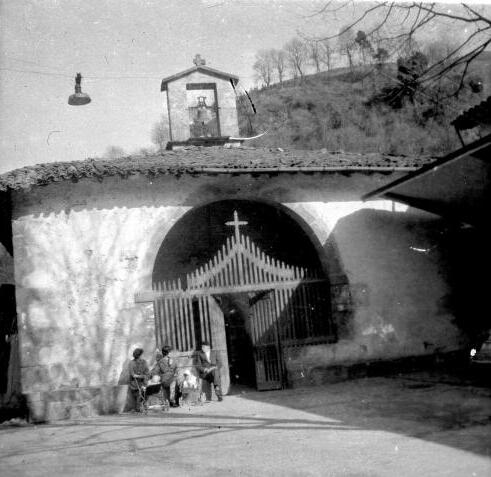 Fachada exterior de la Ermita